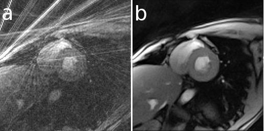 A single frame from a real-time movie of the human heart (2 mm x 2 mm in-plane resolution, 8 mm slice thickness, 15 radial spokes, 30 ms acquisition time) a. conventional gridding reconstruction b. nonlinear inverse reconstruction